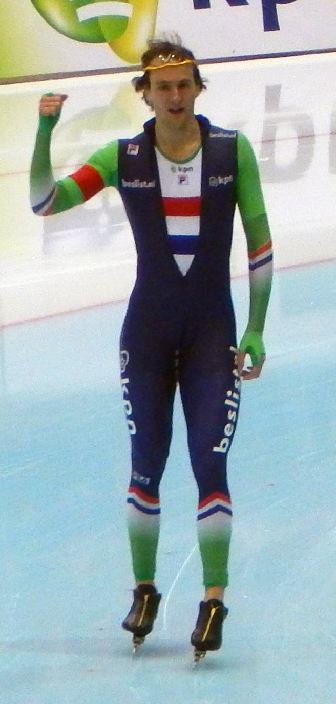 Чемпионат мира по конькобежному спорту 2016 в Коломне. Победитель Денис Юсков и бронзовый призёр Томас Крол после забега на 1500 метров у мужчин